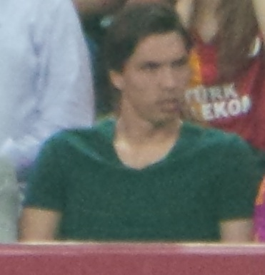 Alperen Uysal